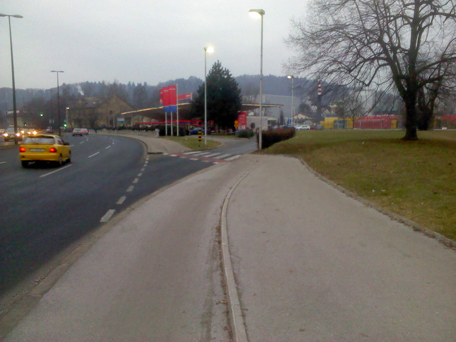 Tivolska cesta v Ljubljani, bencinska črpalka (Petrol): kolesarska steza